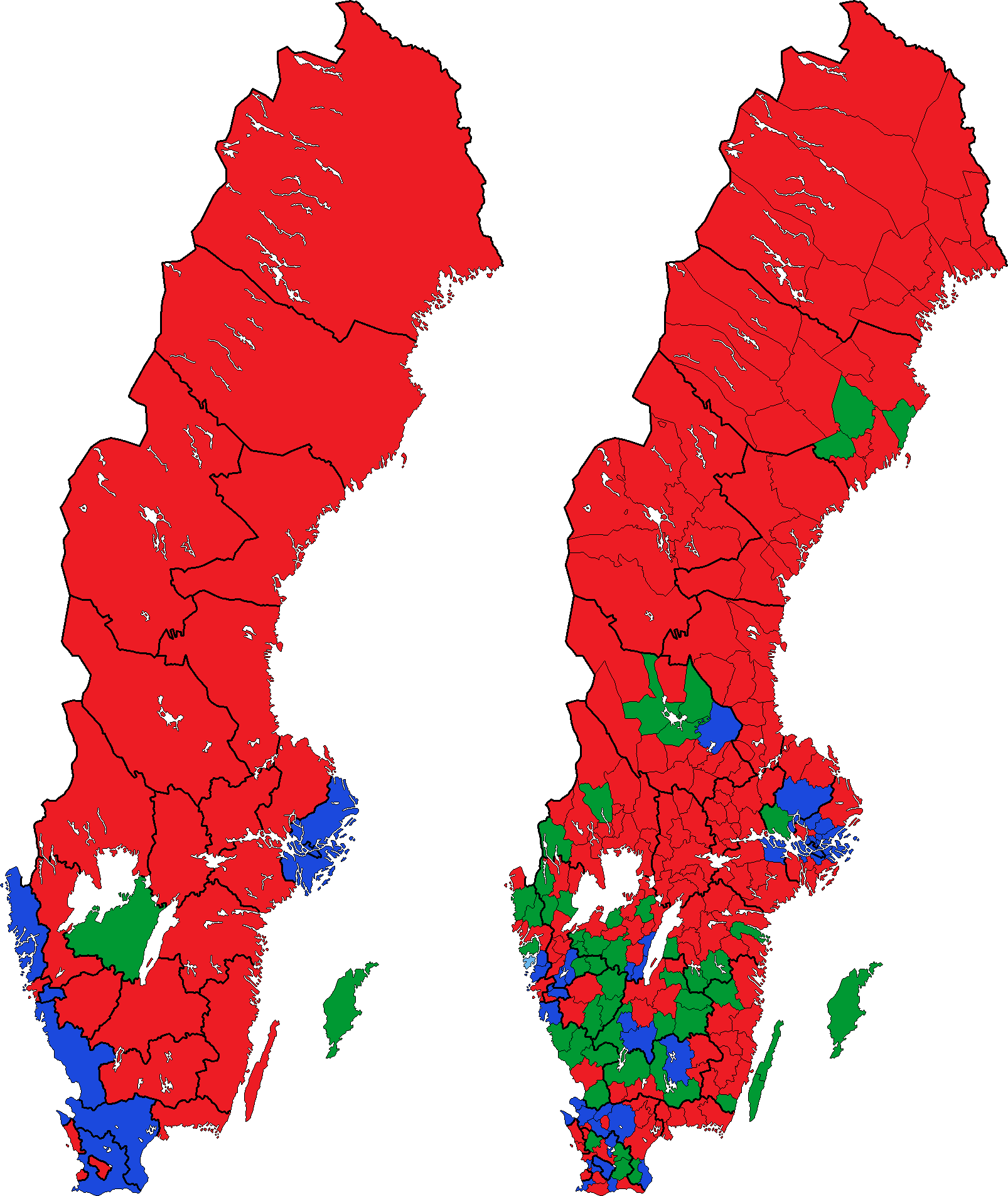 Största parti inom det ledande blocket i samtliga valkretsar och kommuner i riksdagsvalet 1988. Moderata samlingspartiet, Folkpartiet och Centerpartiet har räknats till det borgerliga blocket medan Arbetarpartiet-Socialdemokraterna och Vänsterpartiet kommunisterna har räknats till det socialistiska blocket. Partier därutöver räknas som egna block. Socialdemokraterna Moderaterna Centerpartiet Folkpartiet